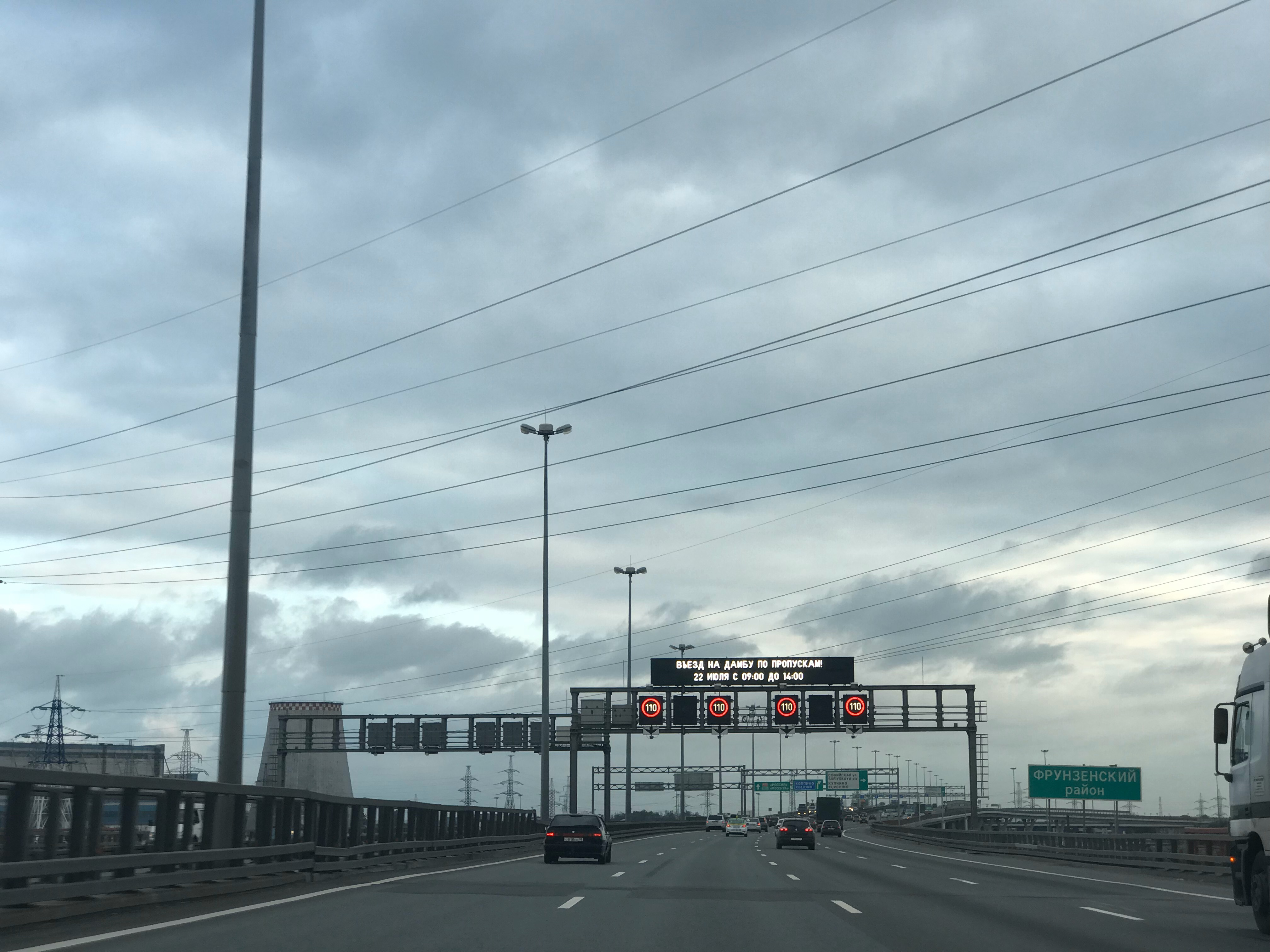 КАД